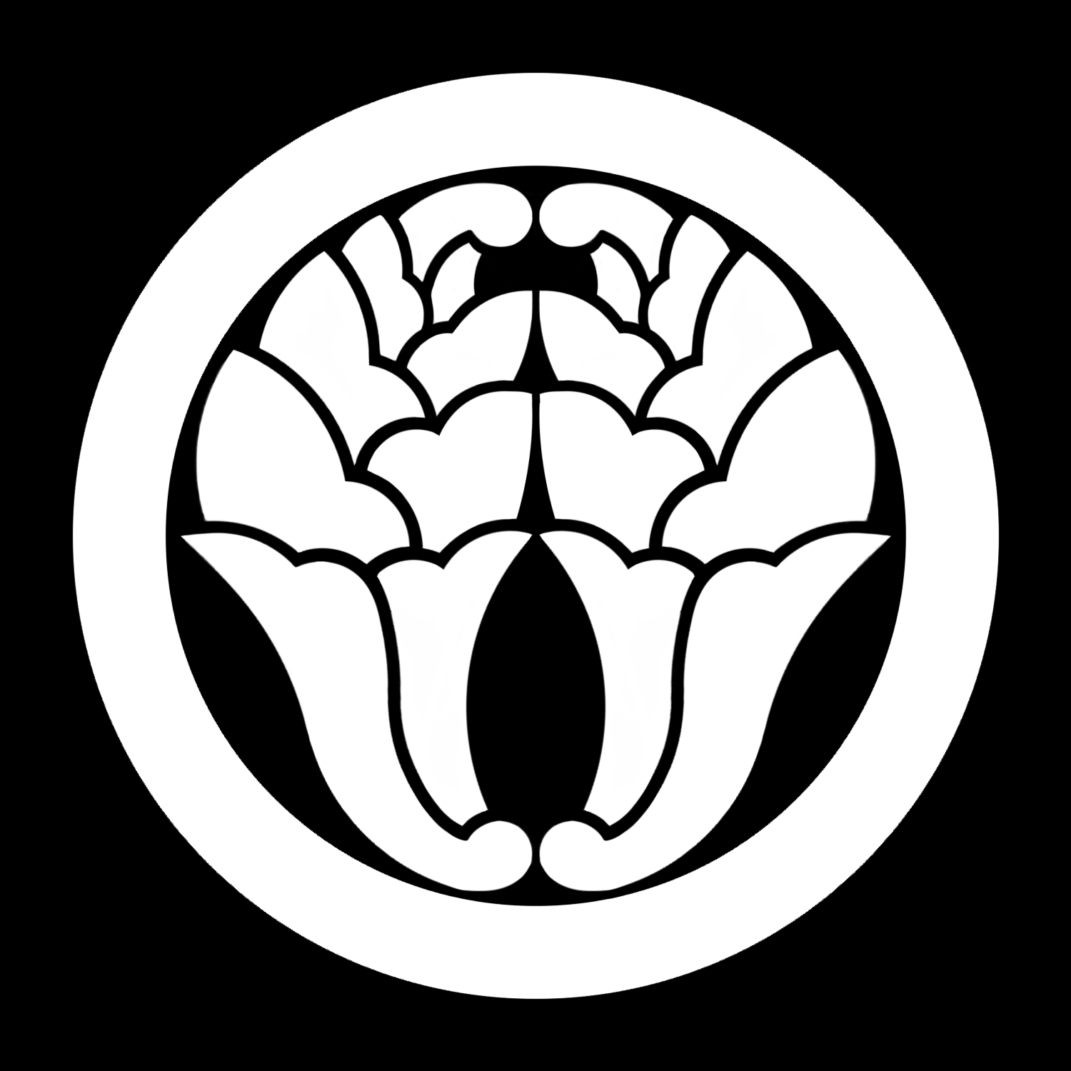 「丸に抱き杏葉」紋（染抜）